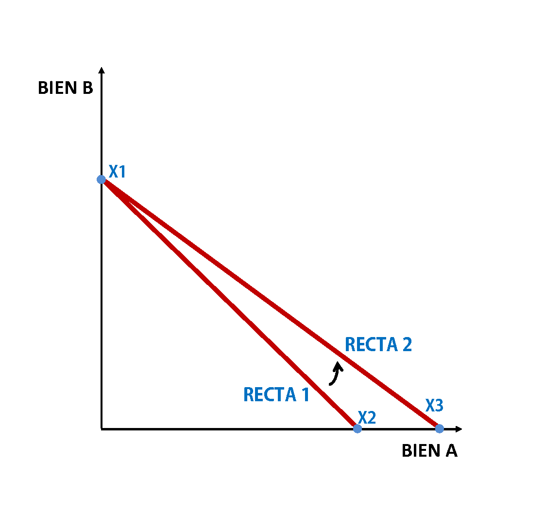 Movimiento de la recta de balance provocado por una bajada del precio del bien A